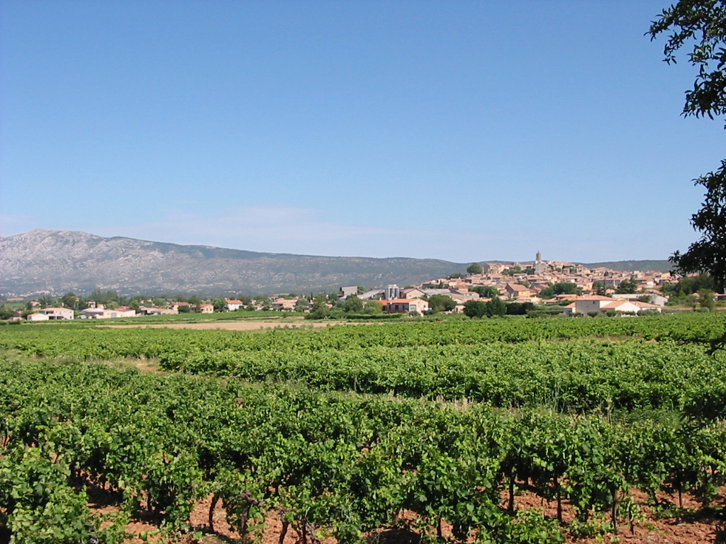 Vue de Pourrières prise depuis le chemin Saint-Pierre